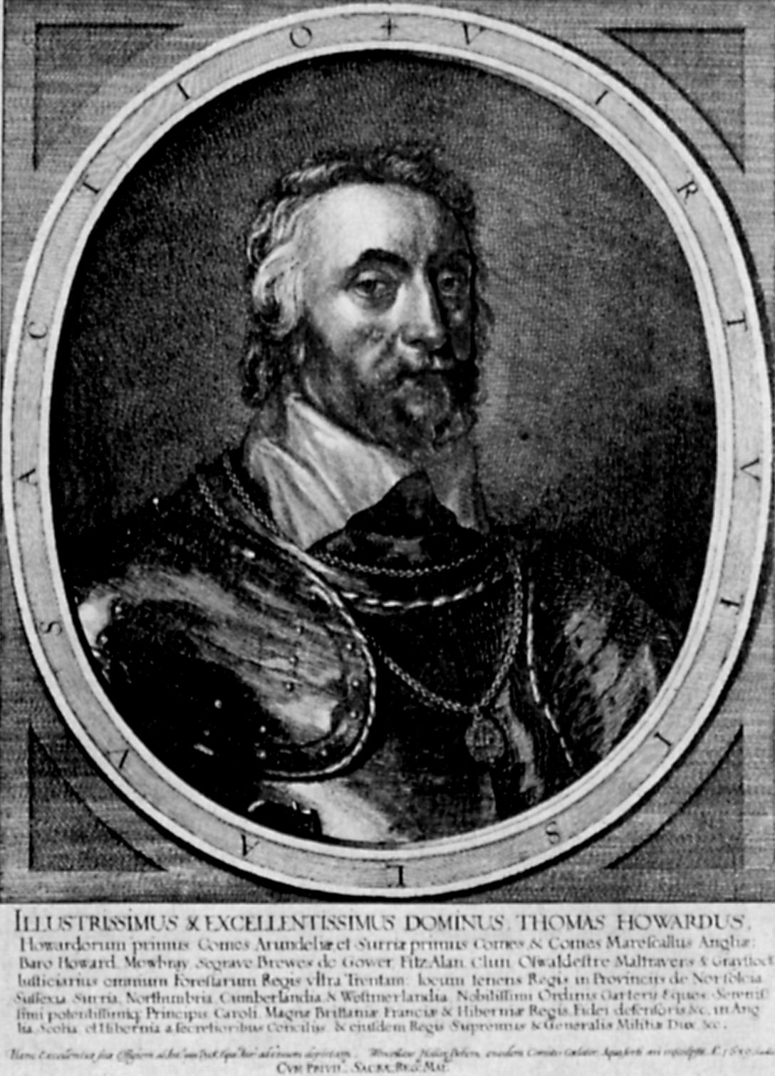 Thomas Howard, 5. Duke of Norfolk